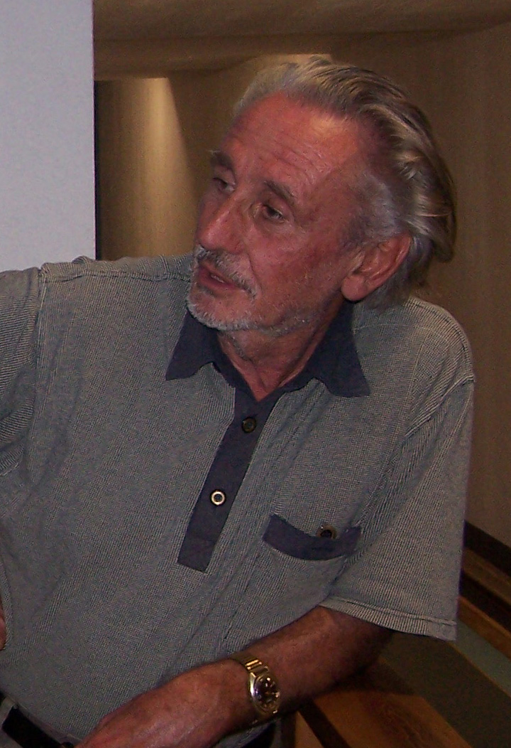 Experimentalphysiker Klaus Hennig